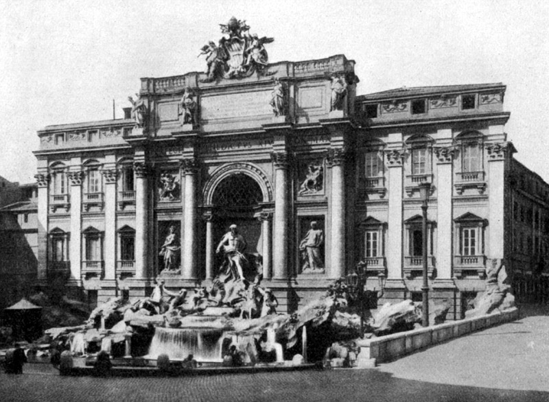 Trevi-Brunnen in Rom.